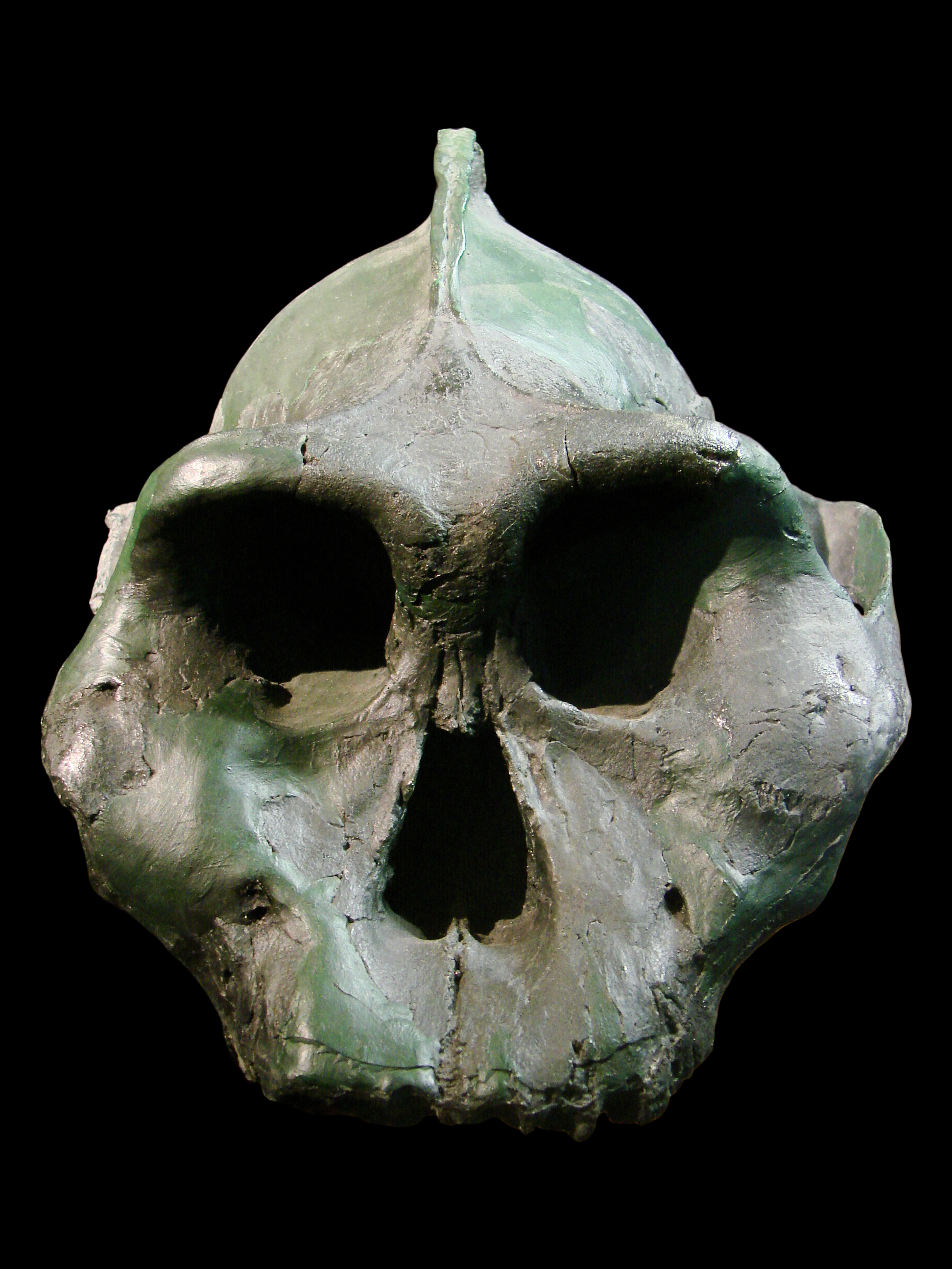 variante avec fond noir